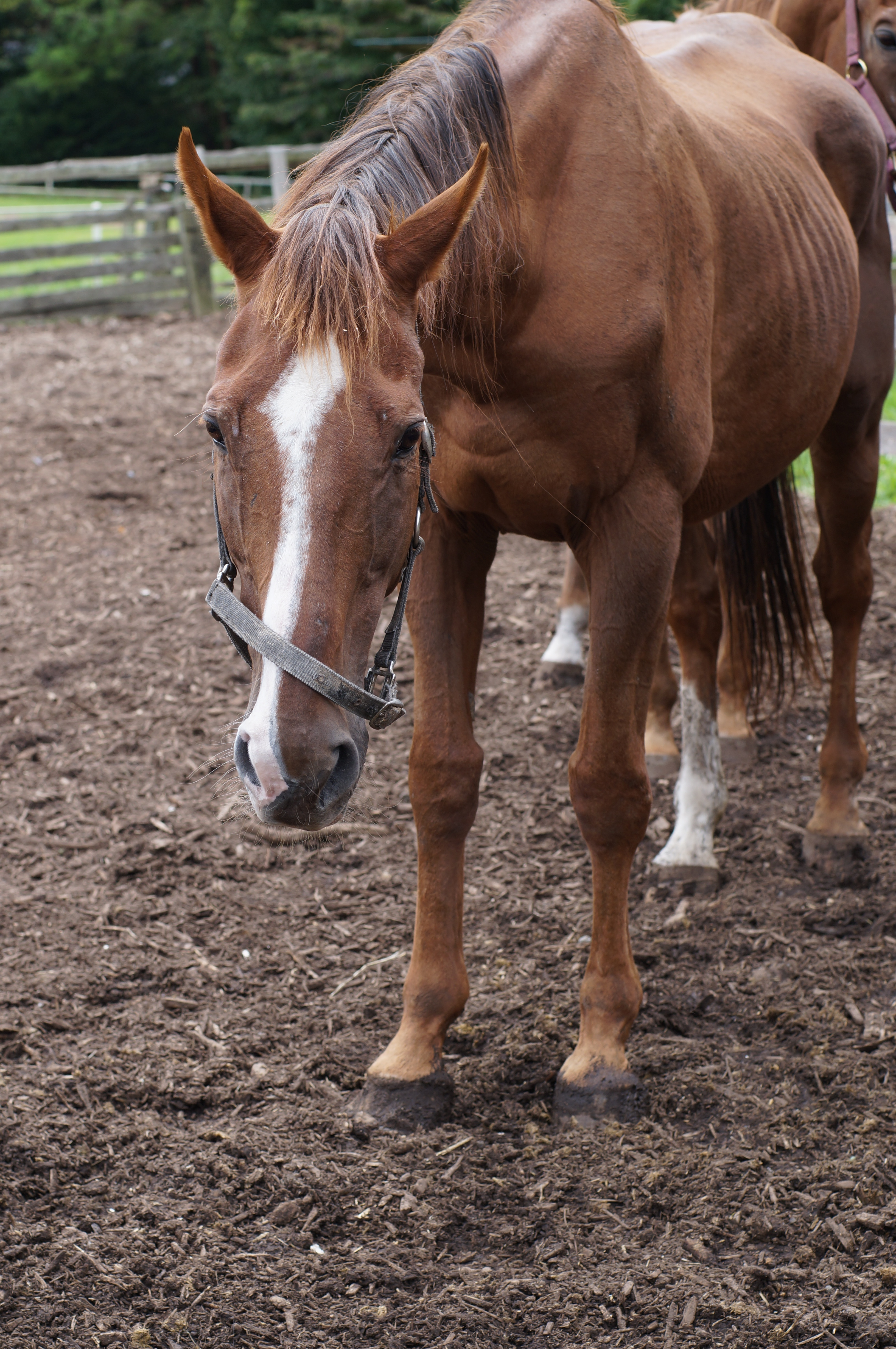 小須田牧場にて